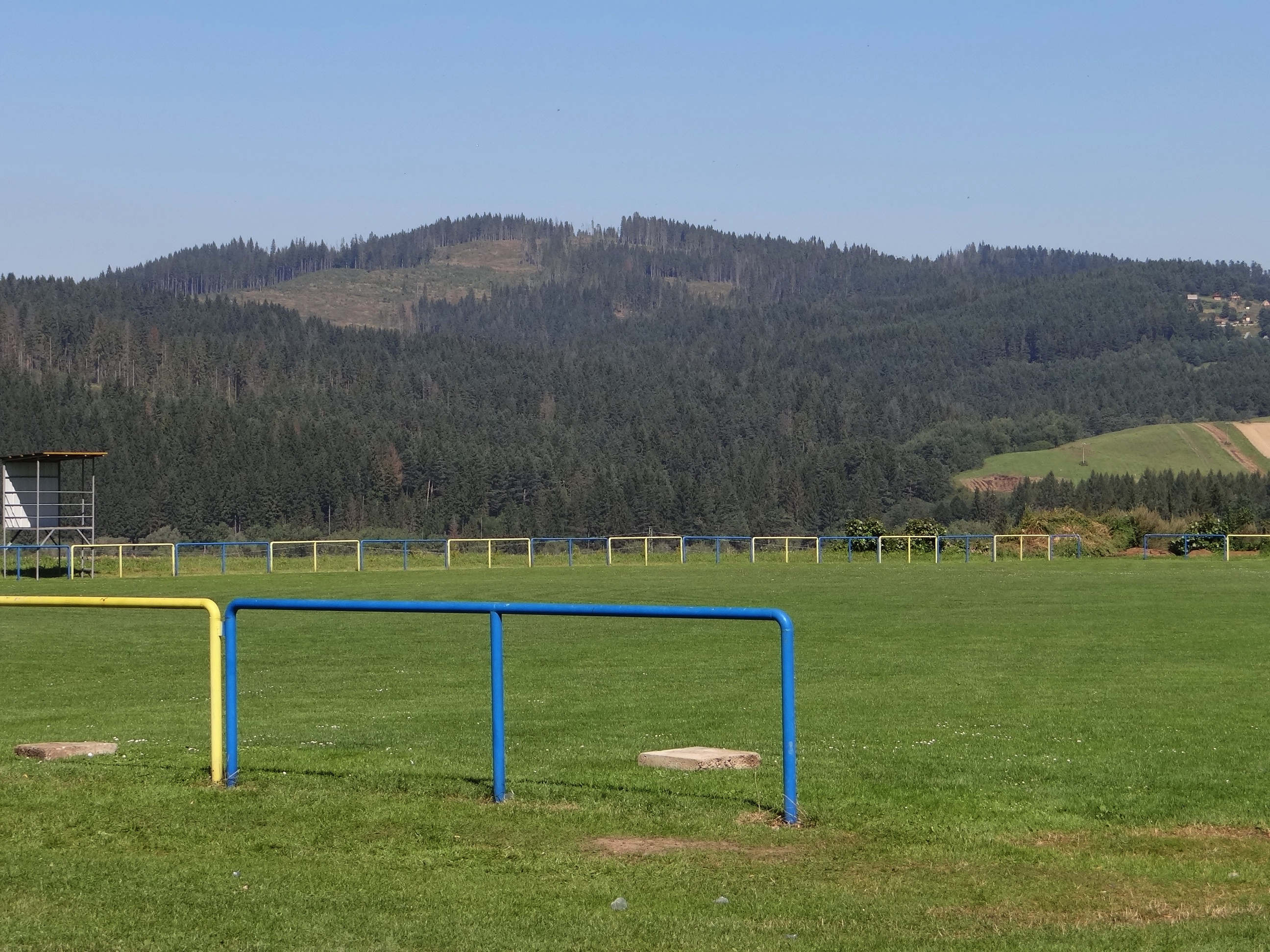 Vavrečka (Wawrzeczka). Widok na Beskidy Kisuckie